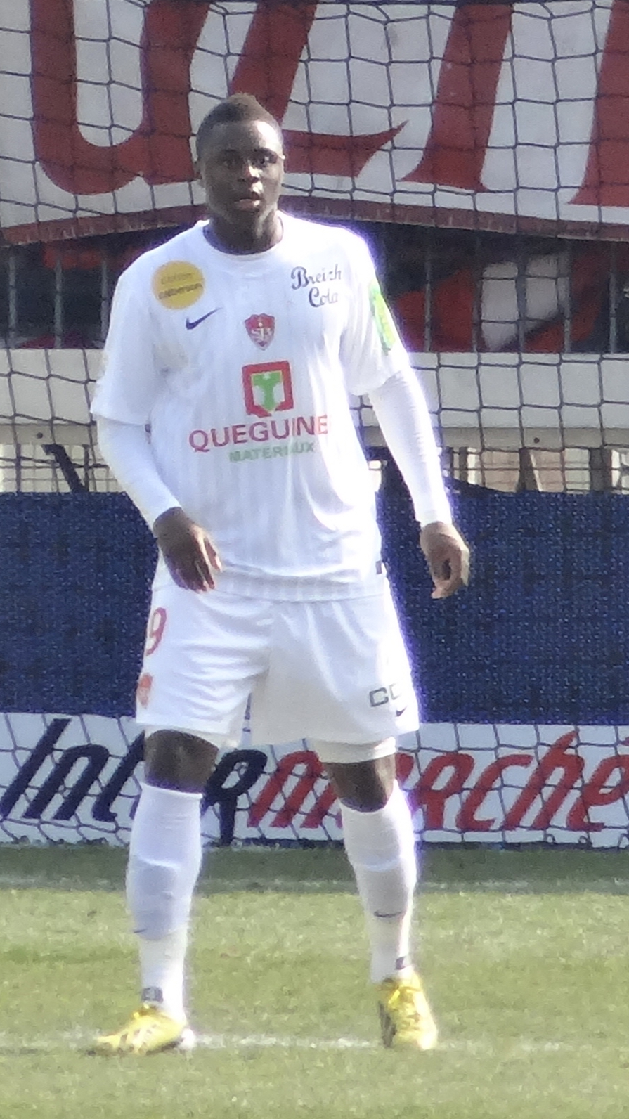 Match de football (Ligue 1) entre le Stade brestois 29 et l'Olympique lyonnais, le 3 mars 2013